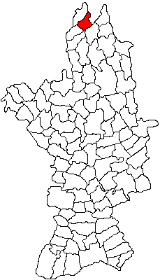 Categorie:Hărţi ale judeţului Olt